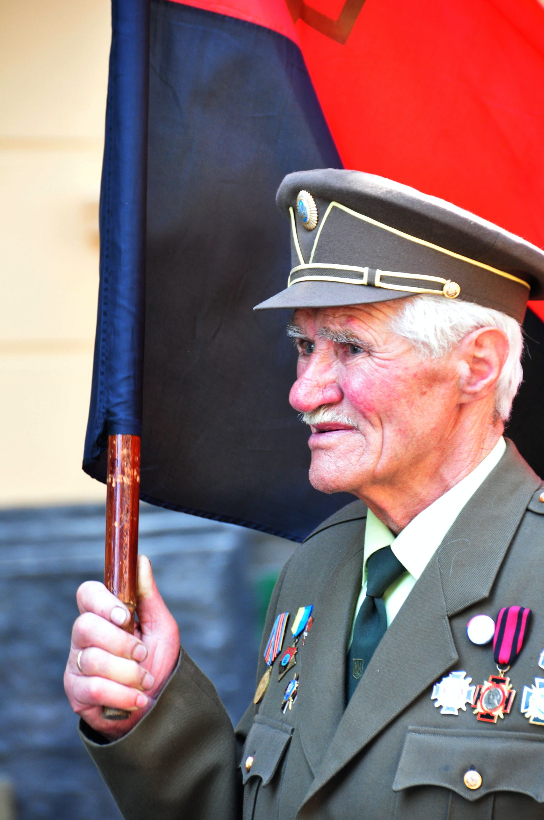 Святкування Дня Героїв у Львові 22 травня 2011 р. Ветеран УПА в колоні демонстрантів.